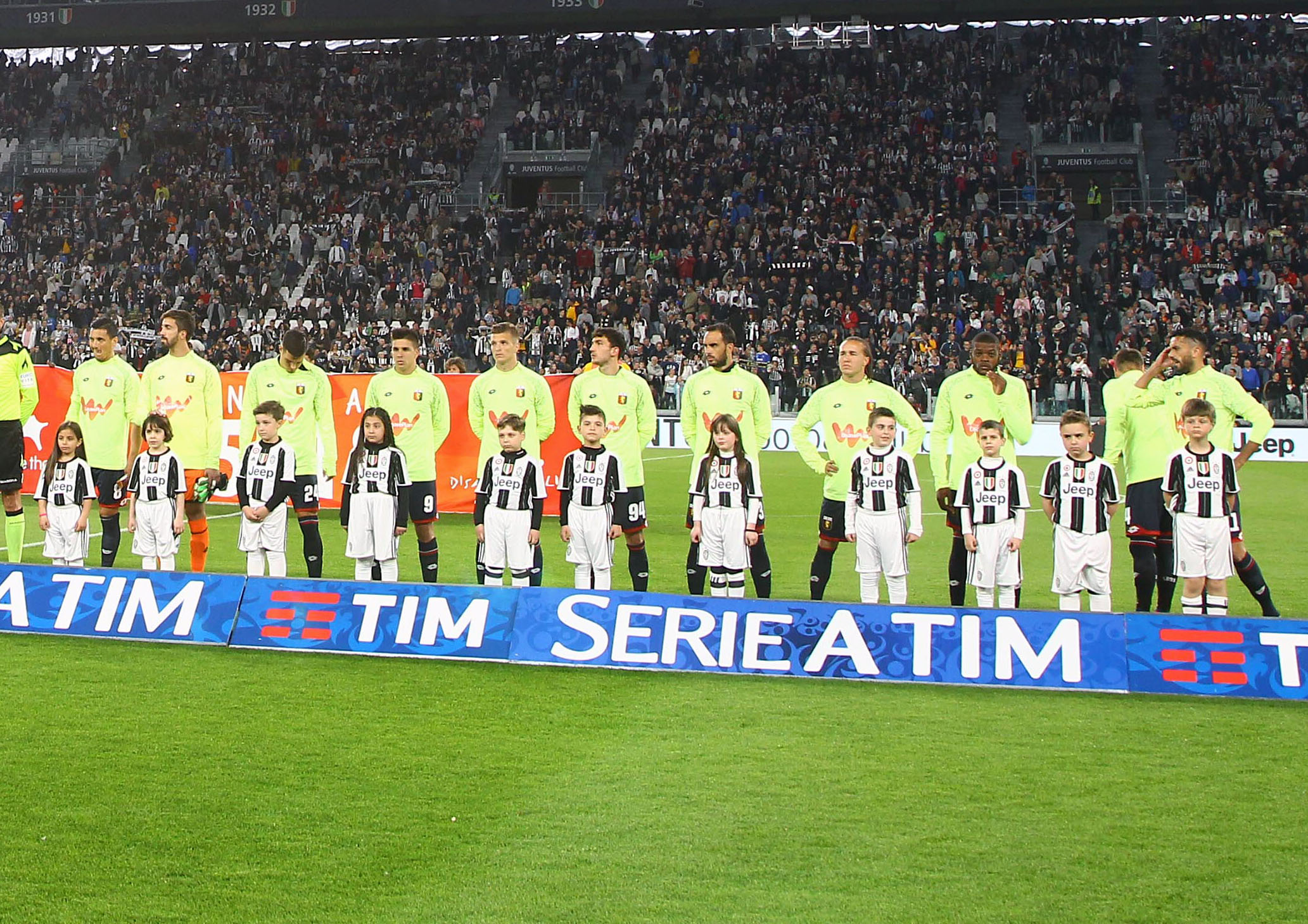 Torino, Juventus Stadium, 23 aprile 2017. La formazione del Genoa CFC scesa in campo nella trasferta persa contro la Juventus FC (0-4) e valevole per la 33ª giornata del campionato italiano di Serie A 2016-17.